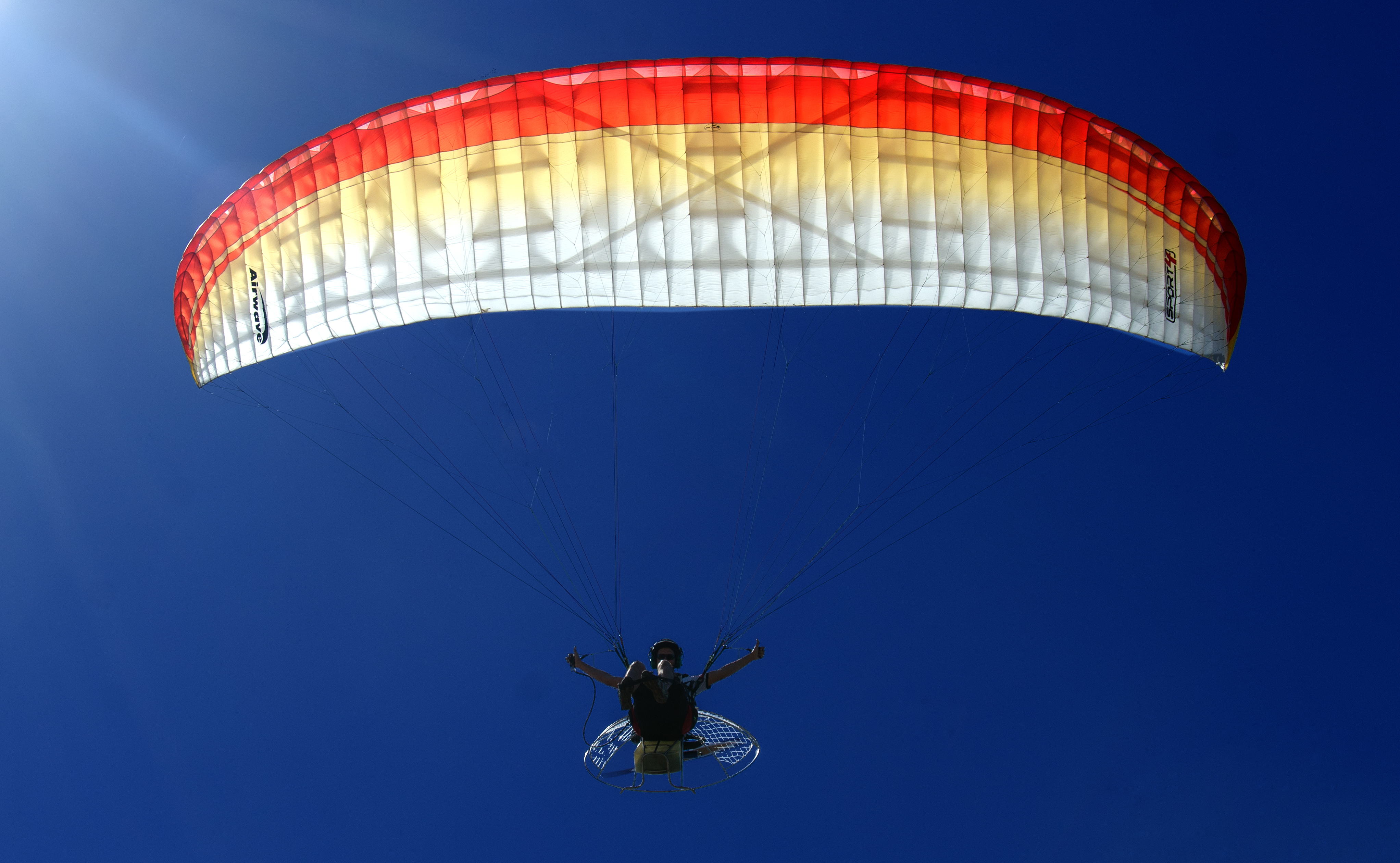 Vuelo en parapente con motor, paramotor.